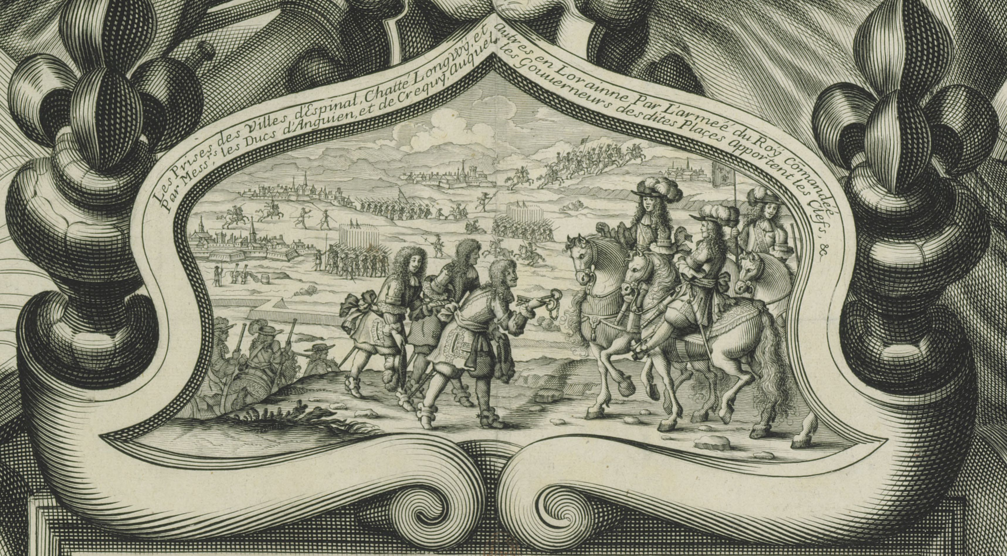 Par De Larmessin (Graveur), détails de l'Almanach pour l'an de grâce M. DC. LXXI (1671), édité à Paris chez Pierre Bertrand (rue St. Jacques à la pomme d'or). Le document original est conservé à la bibliothèque national de France (